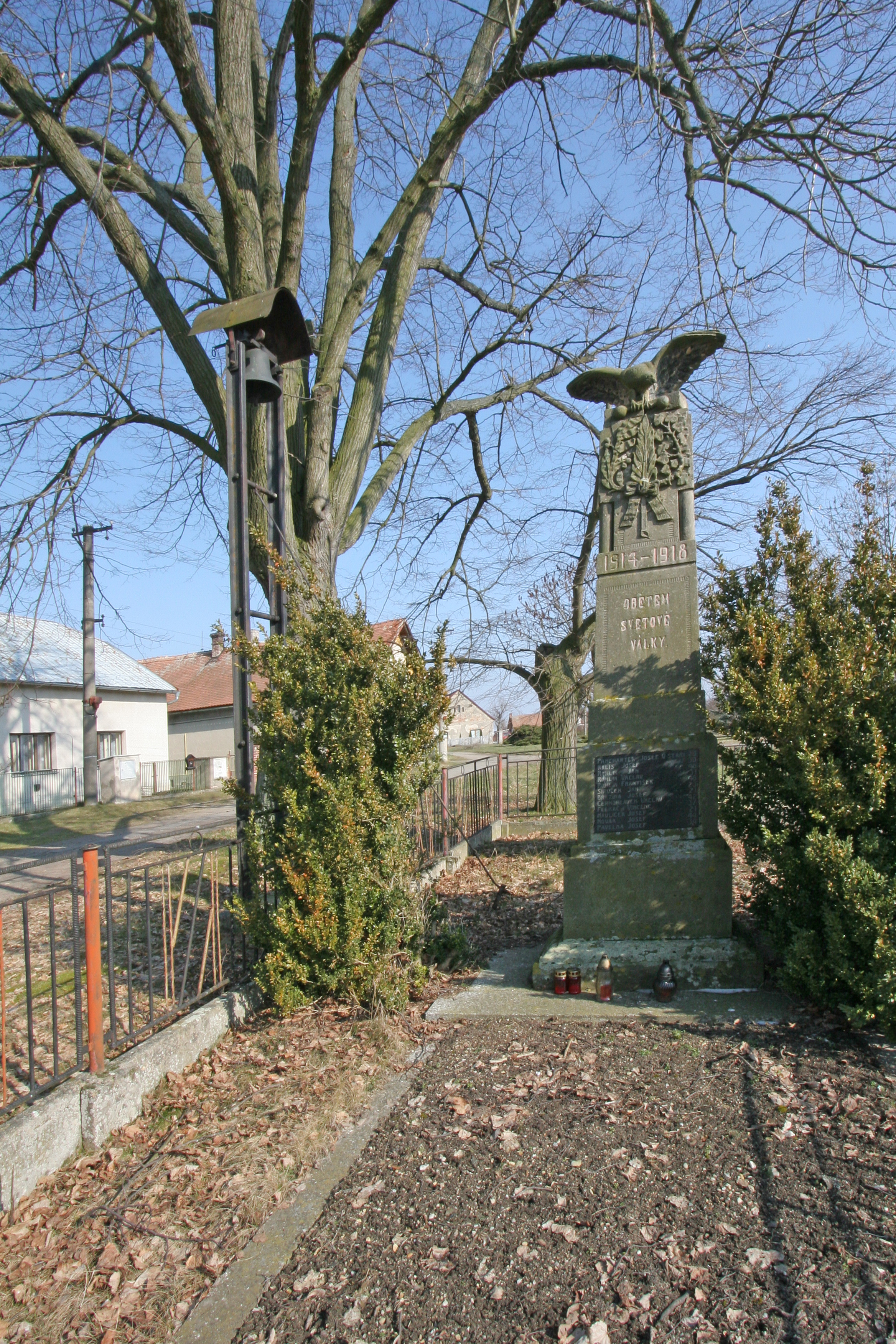 Kasalice zvonička a pomník padlým